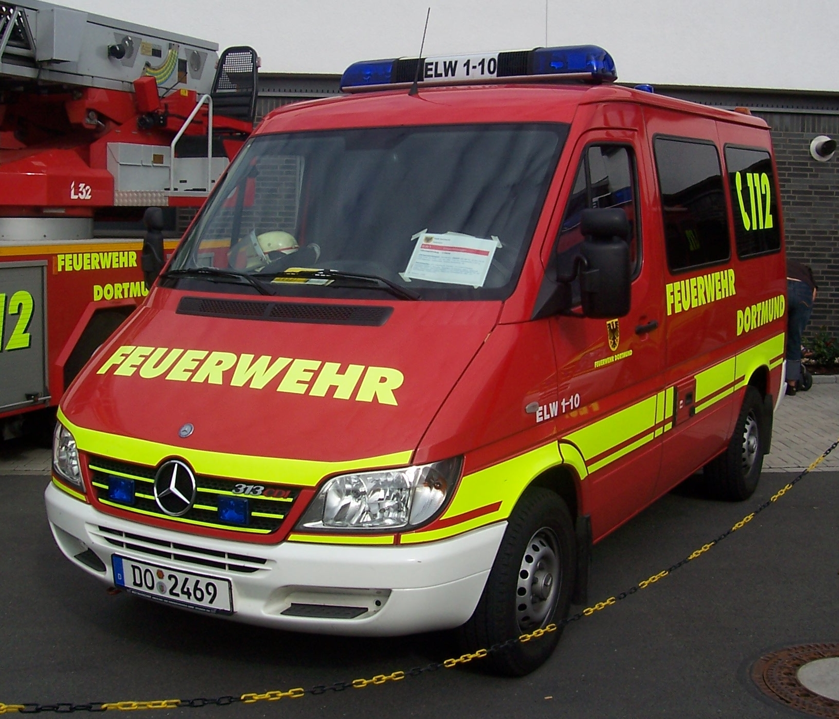 ELW 1 der Berufsfeuerwehr Dortmund - Command vehicle of the fire department Dortmund, Germany